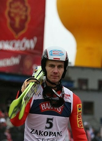 Wojciech Skupień - polski skoczek narciarski podczas Pucharu Świata w skokach narciarskich Zakopane 2007.